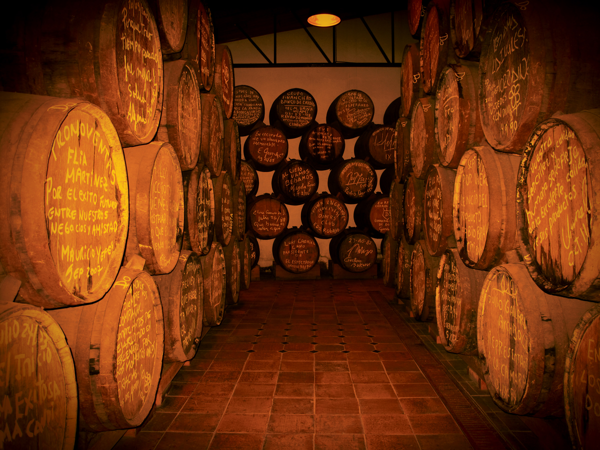 Solera Pedro Domecq Colombia (PDC Vinos y Licores Ltda.)